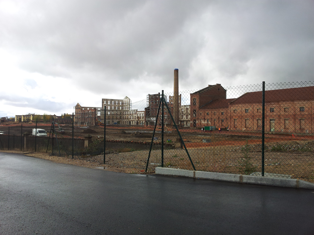 Trasera de la azucarera de Santa Elvira, León, durante las obras de reforma para convertirse en el PCEX de León.